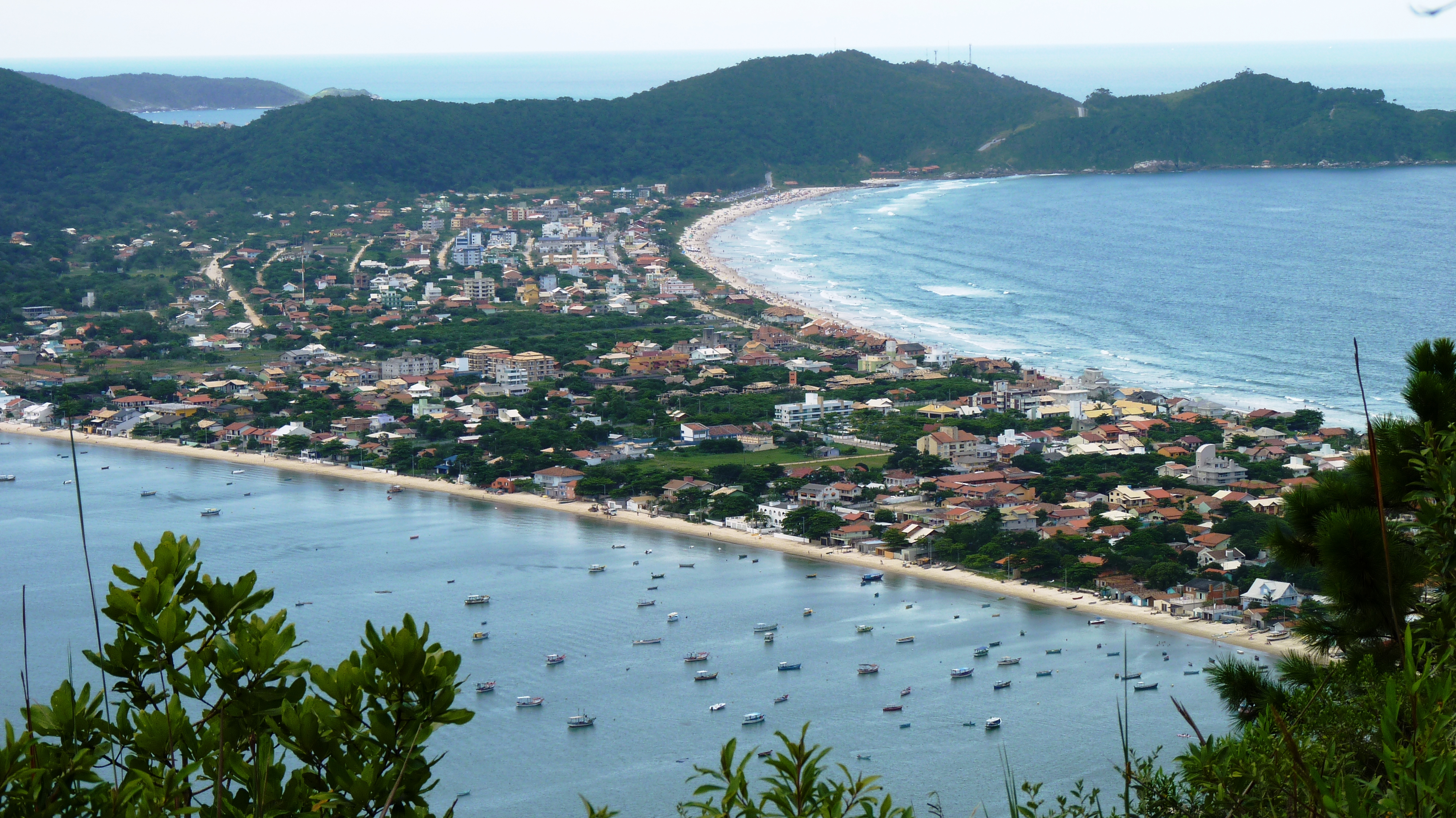 Bombinhas, Santa Catarina, Brasil